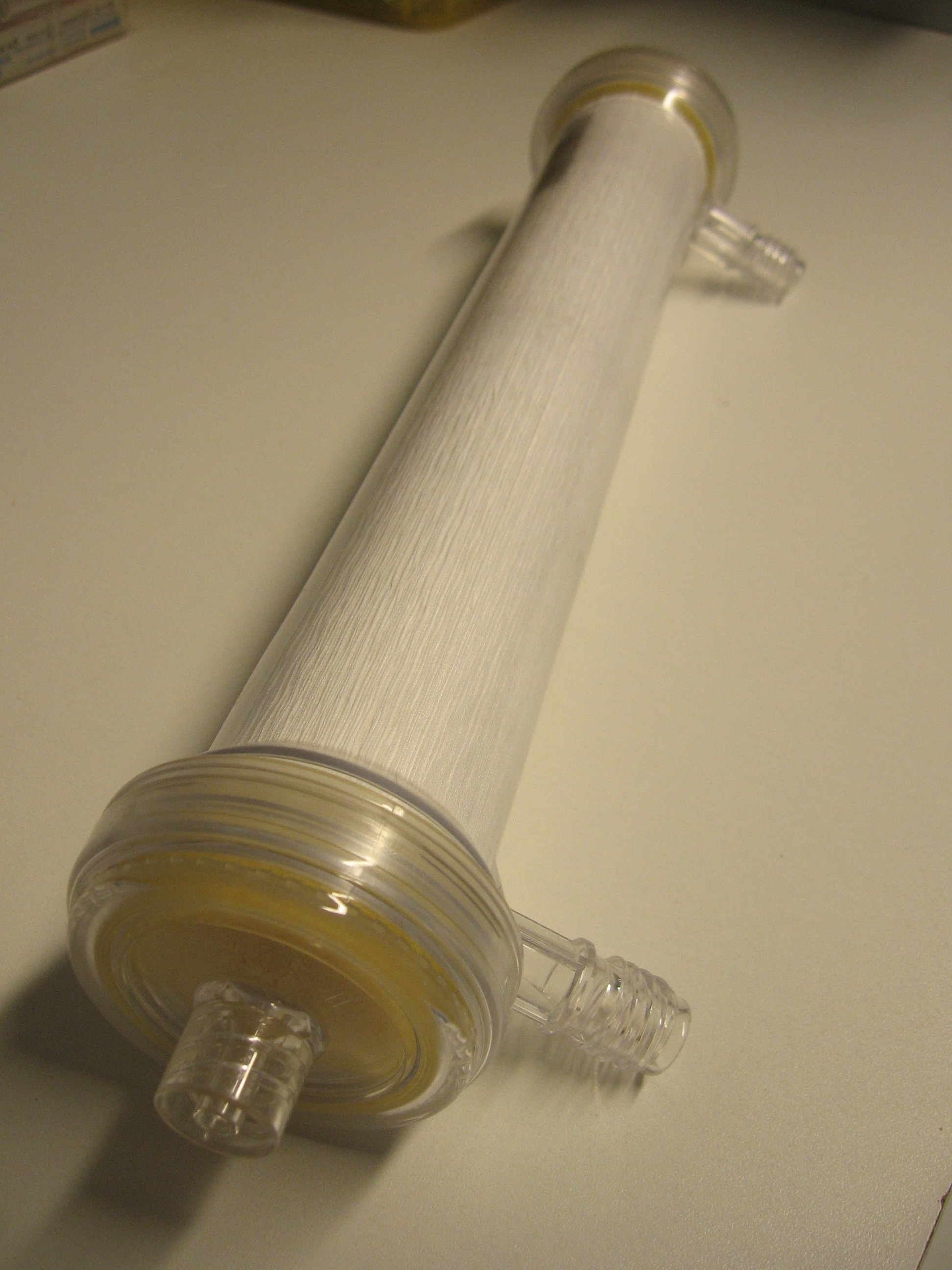 kunstnier